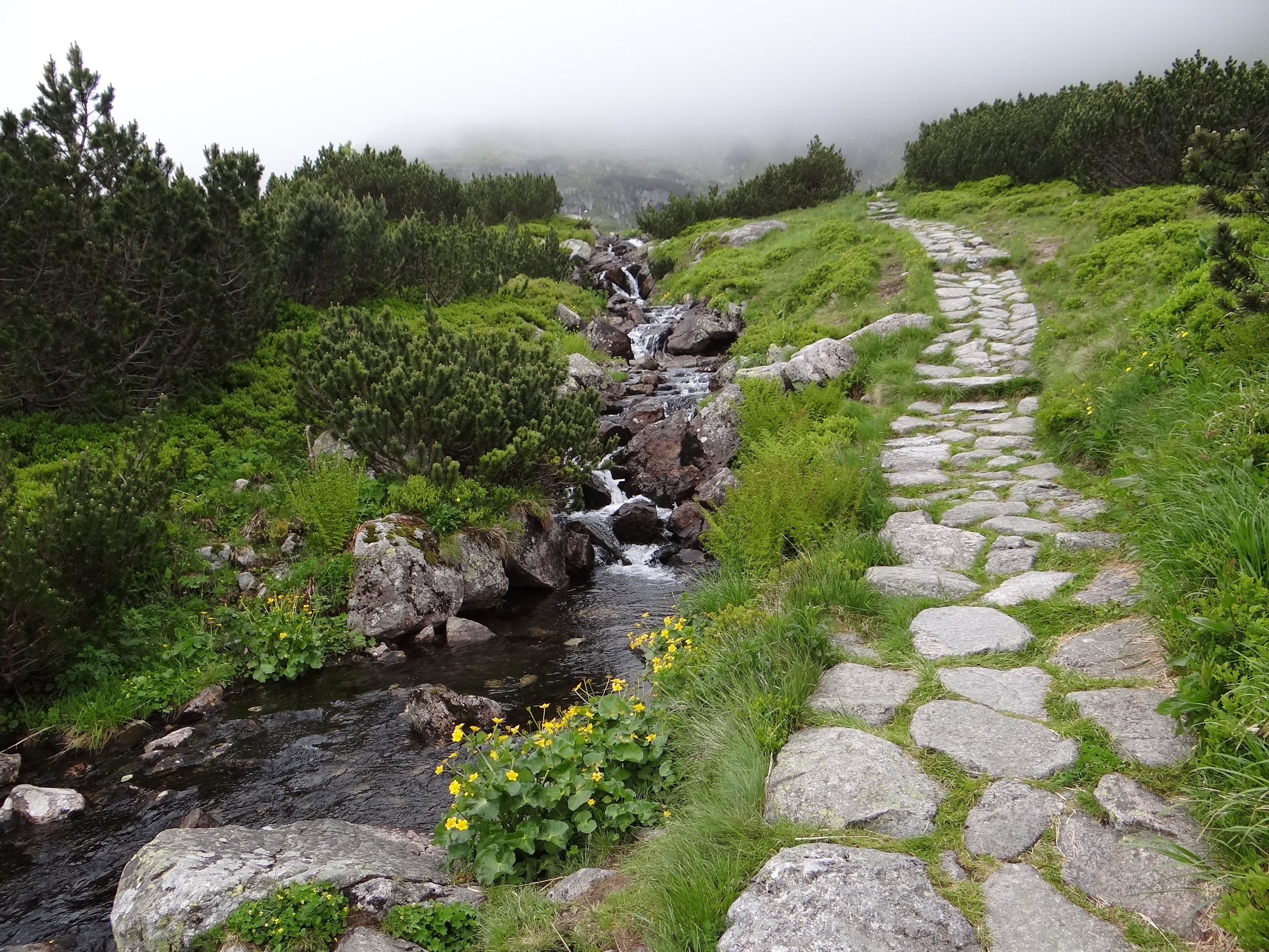 Jeden ze źródłowych cieków Suchej Wody (wypływający z Zielonego stawu Gąsienicowego)